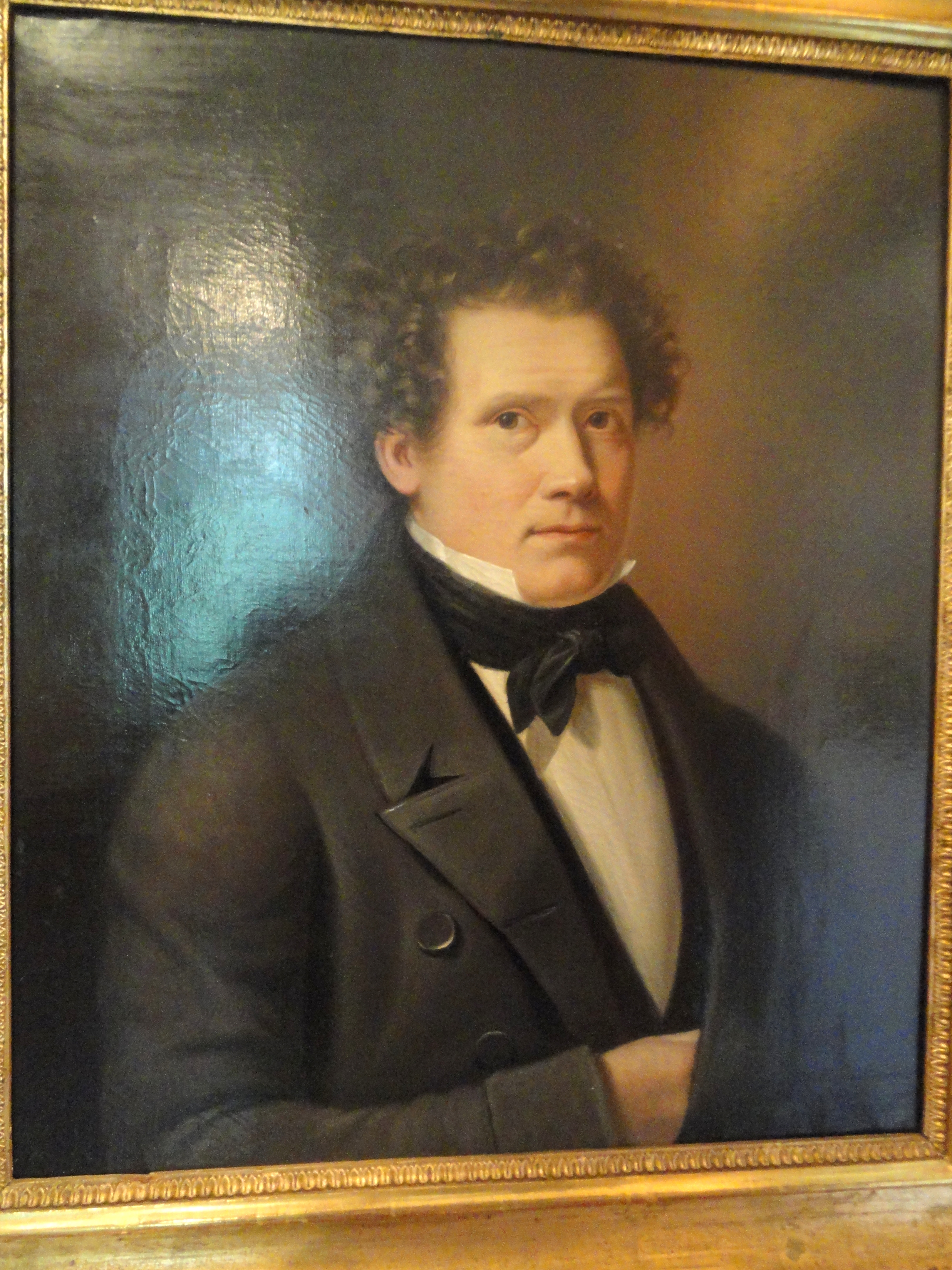 Self-portrait